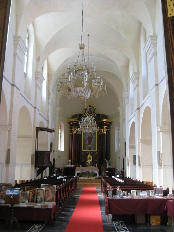 Мір. Мікалаеўскі касцёл